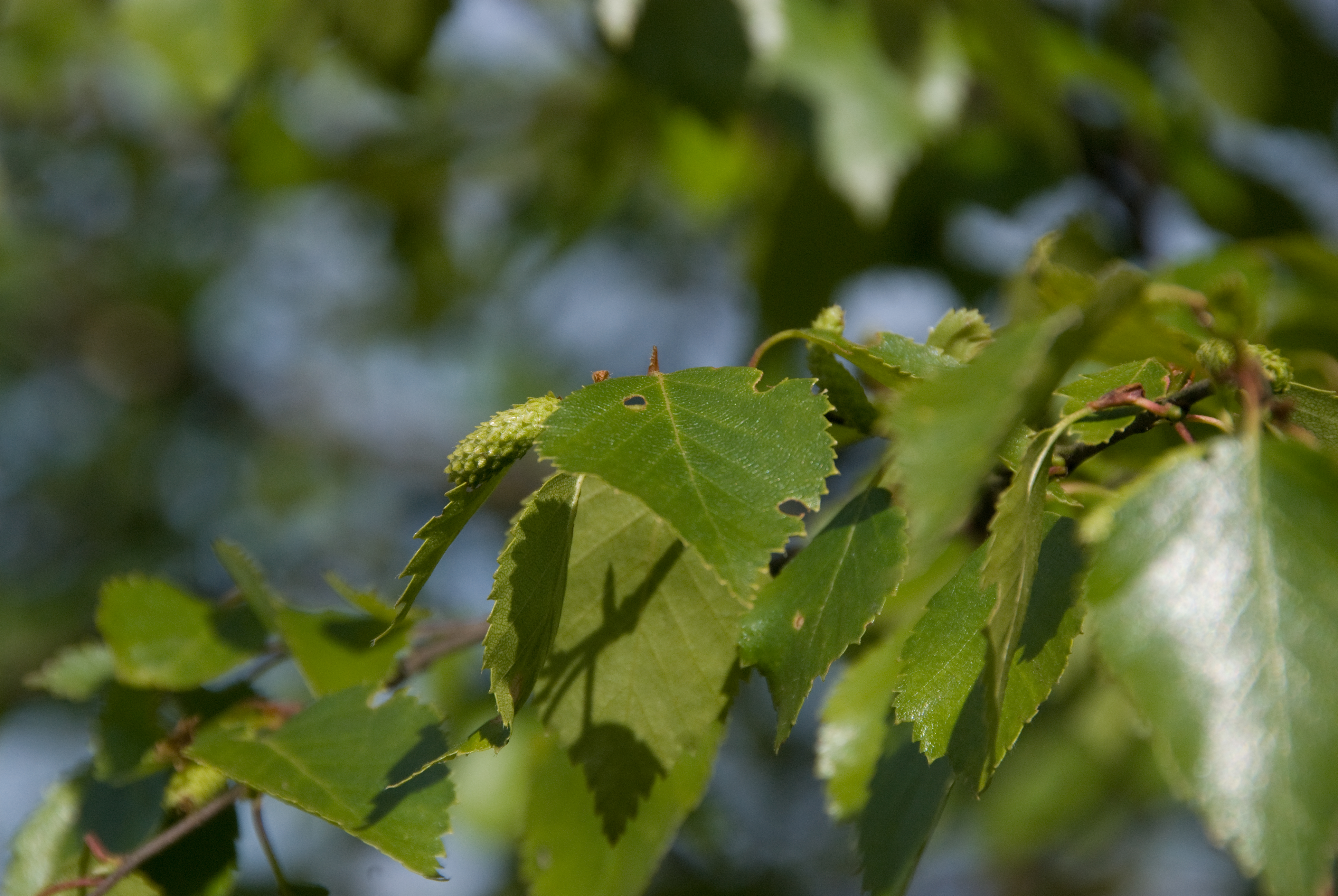 Birkenblätter im Dosenmoor, Deutschland